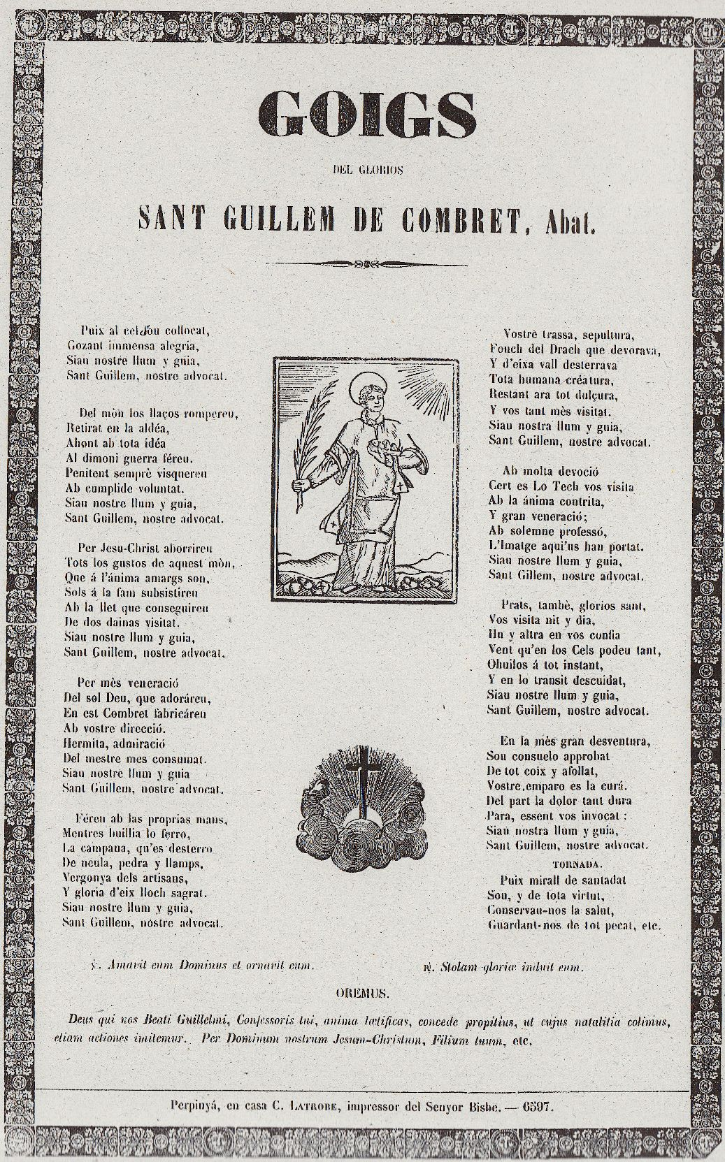 Goig de Saint Guillem de Combret